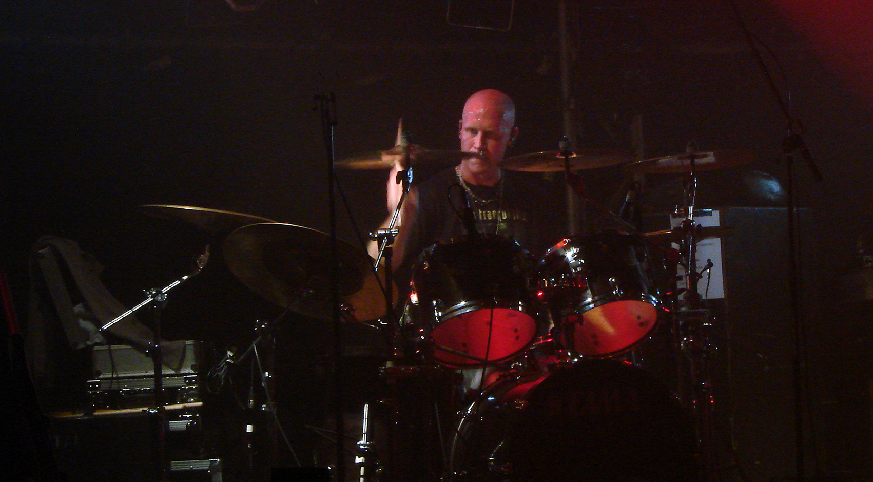 Dark Tranquillity, concert du 12/10/07 à la Locomotive à Paris. Anders Jivarp.